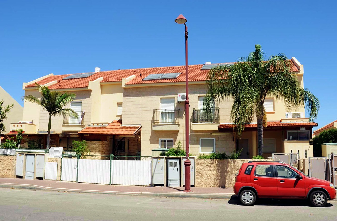 פנינת גן יבנה, ישראל